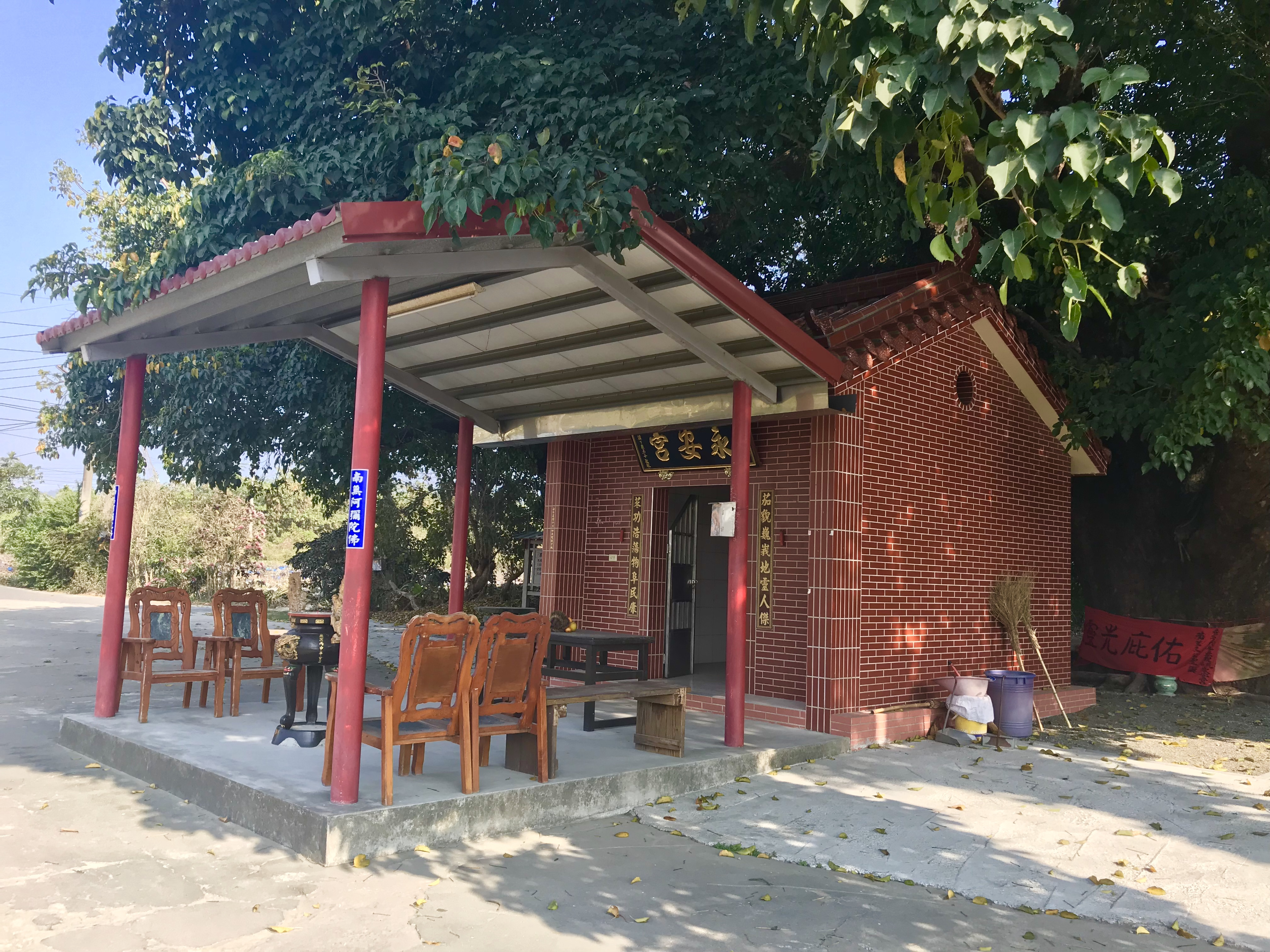 中文（台灣）: 新庄永安宮